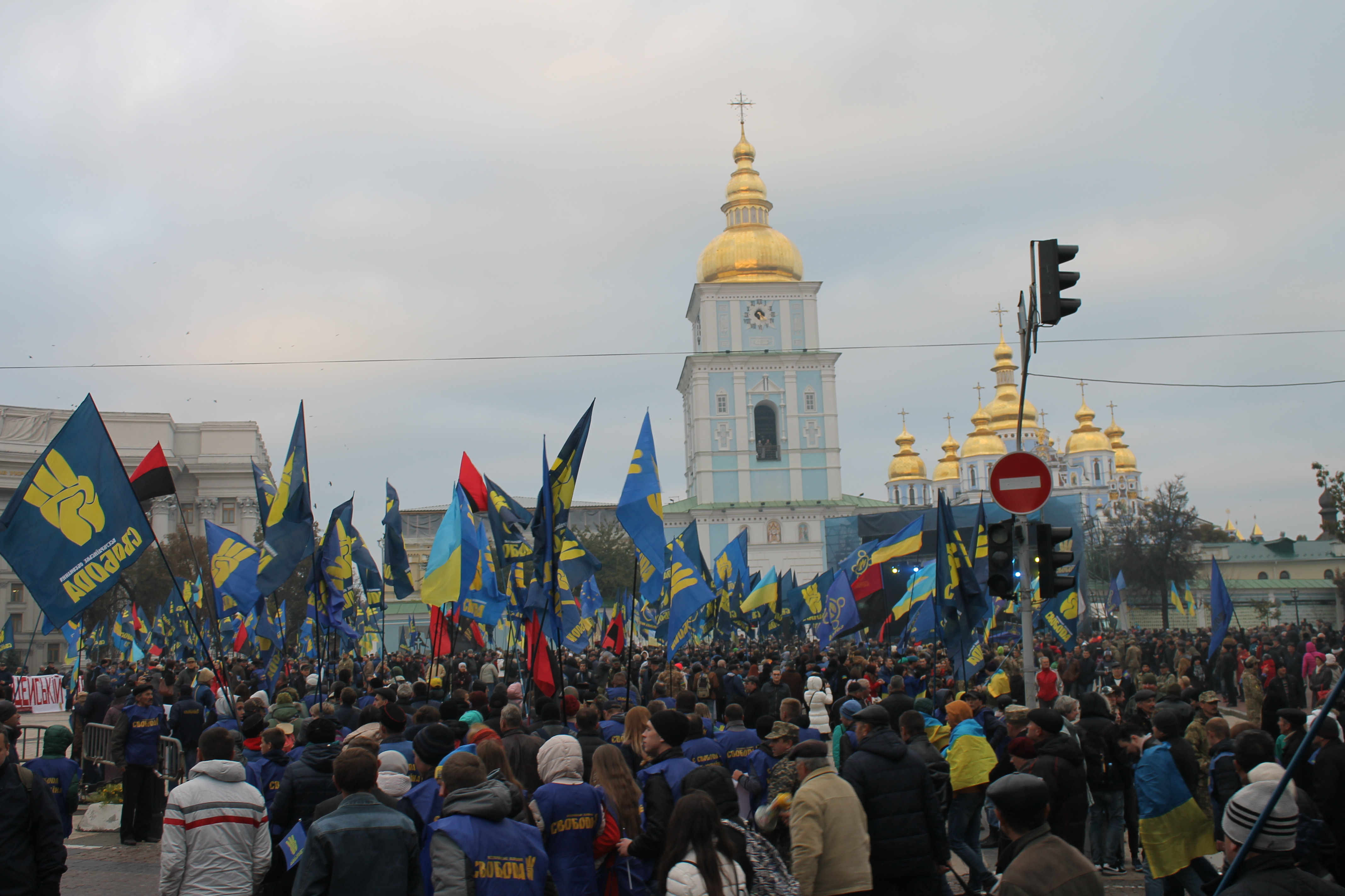 Марш з нагоди 74-ї річниці УПА, Київ